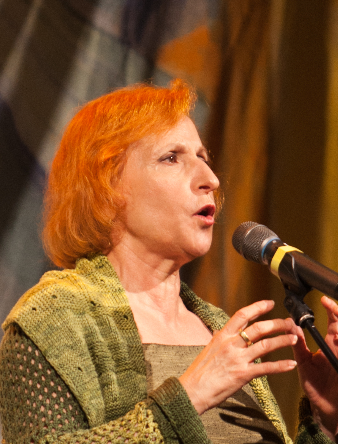 Il cantautrice Lucilla Galeazzi in Rudolstadt 2013 Der Liedermacherin Lucilla Galeazzi beim TFF Rudolstadt 2013